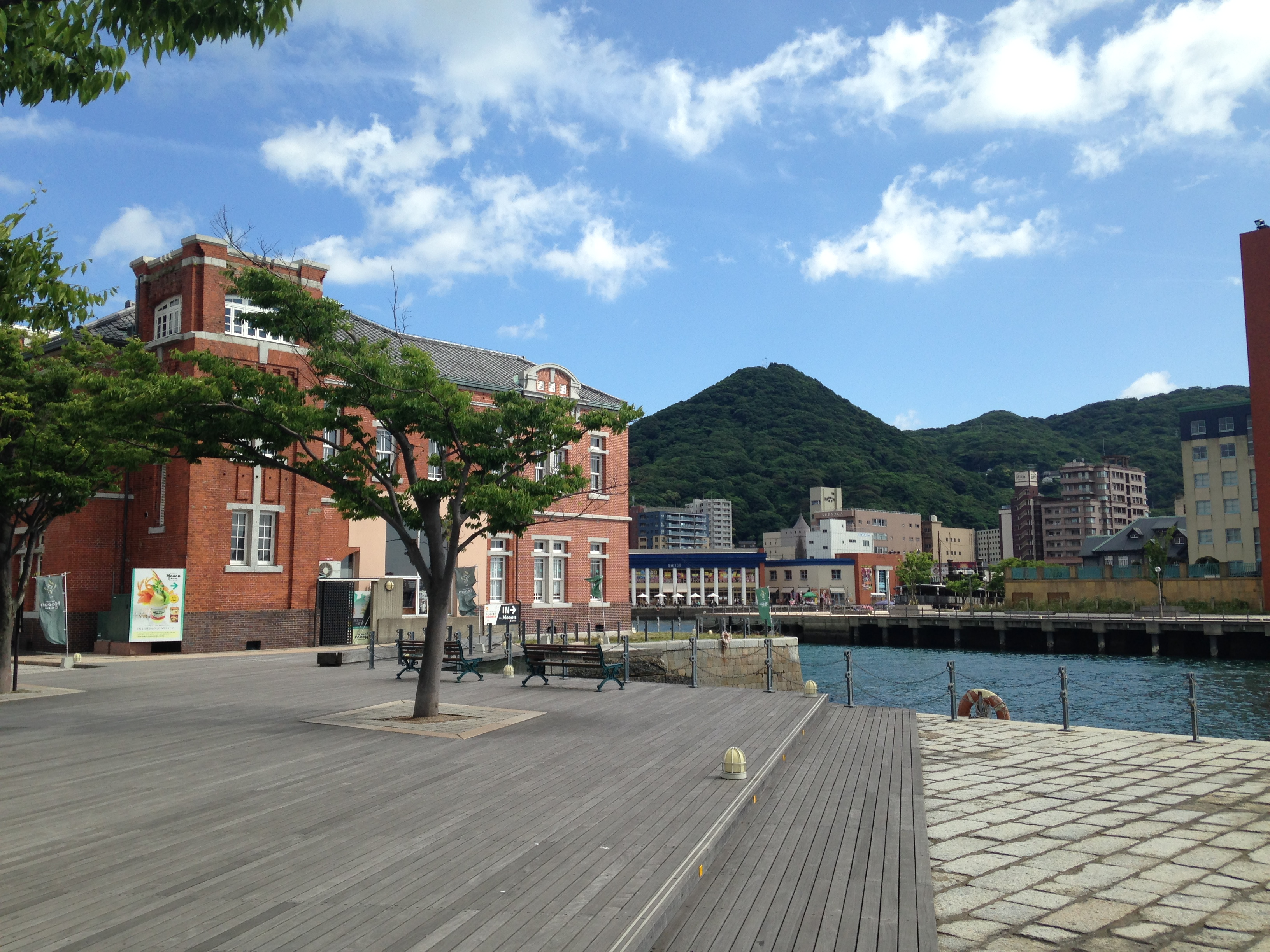 旧門司税関と門司港レトロ